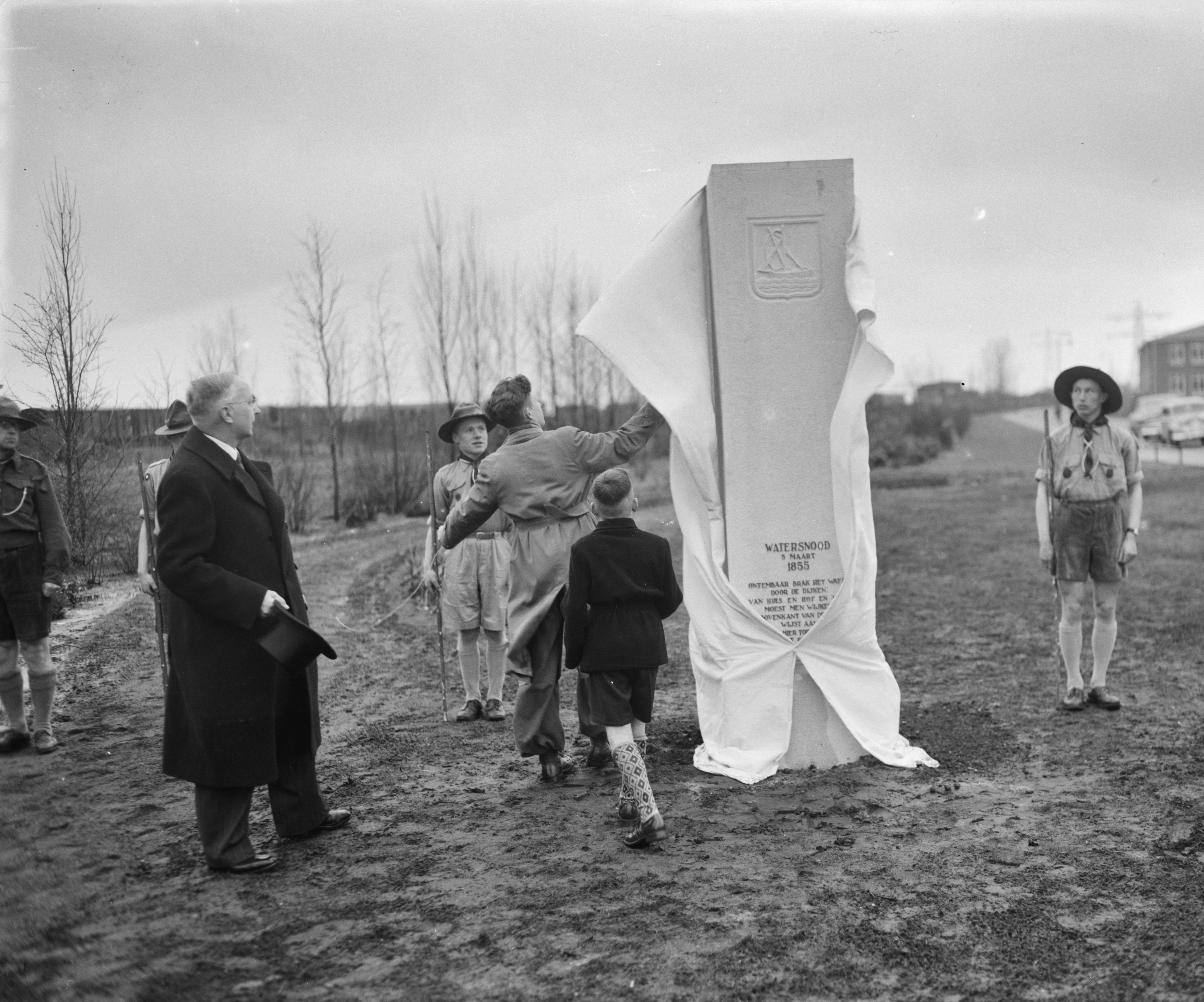 Collectie / Archief : Fotocollectie Anefo Reportage / Serie : [ onbekend ] Beschrijving : Veenendaal 100 jaar watersnood herdenking Datum : 5 maart 1955 Locatie : Utrecht, Veenendaal Trefwoorden : herdenkingen, monumenten, onthullingen Fotograaf : Noske, J.D. / Anefo Auteursrechthebbende : Nationaal Archief Materiaalsoort : Negatief (zwart/wit) Nummer archiefinventaris : bekijk toegang 2.24.01.04 Bestanddeelnummer : 907-0003 Reacties Geplaatst door Maaike op 13 januari 2013 - 16:38. Onthulling monument door de heer D. Sandbrink, dijkgraaf van het Dijkschap Grebbedijk; samen met Herman Jansen en Gerrit van Wijk, nakomelingen van slachtoffers van de watersnoodramp 1855. De heer G.C. van Stuijvenberg, waarnemend directeur van Gemeentewerken is de ontwerper van het monument. Het werd vervaardigd steenhouwerij Buddingh Trefwoorden: Watersnood 1855 Persoonsnamen: D. Sandbrink; Herman Jansen; Gerrit van Wijk